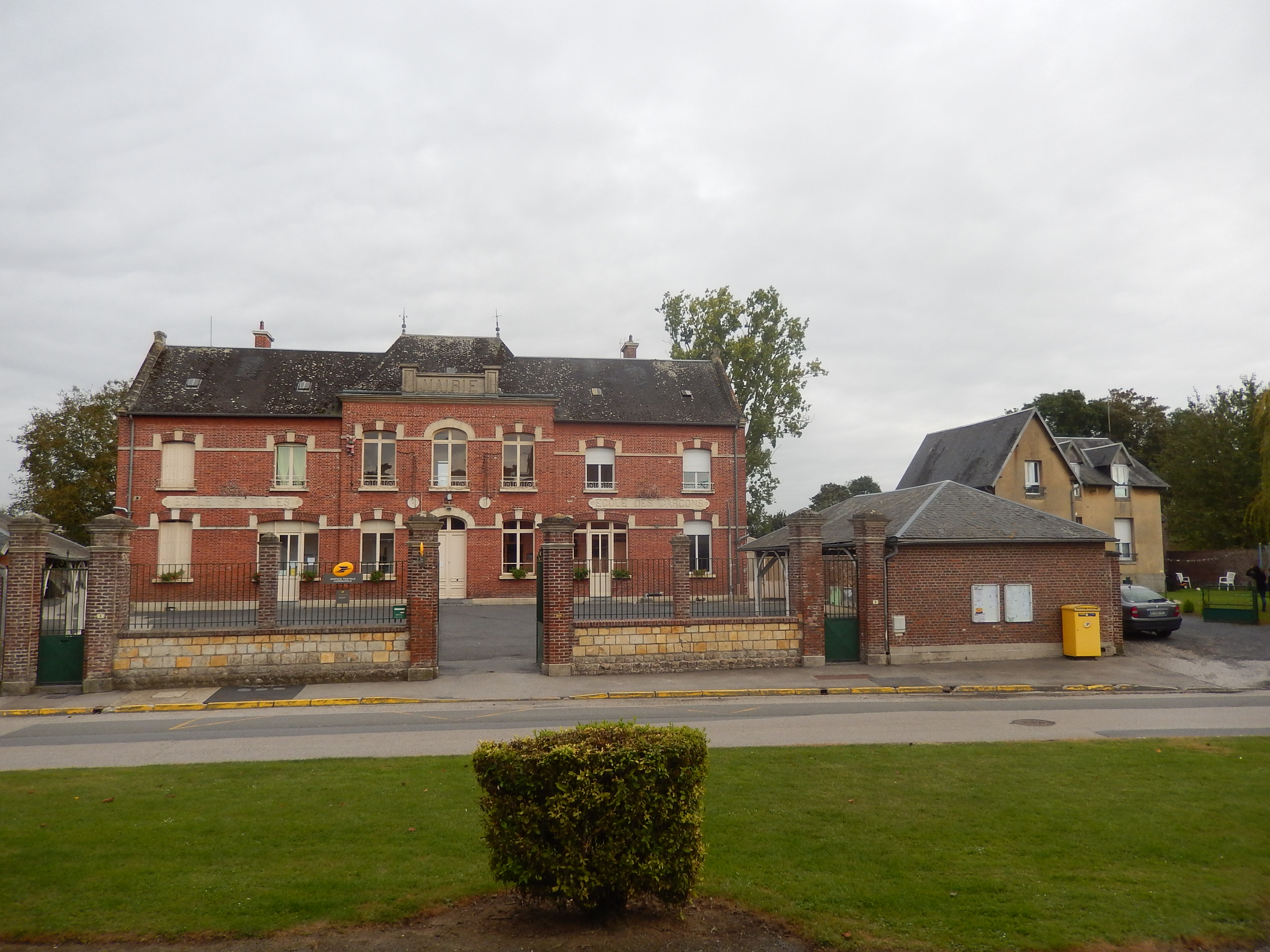 Matigny - la mairie